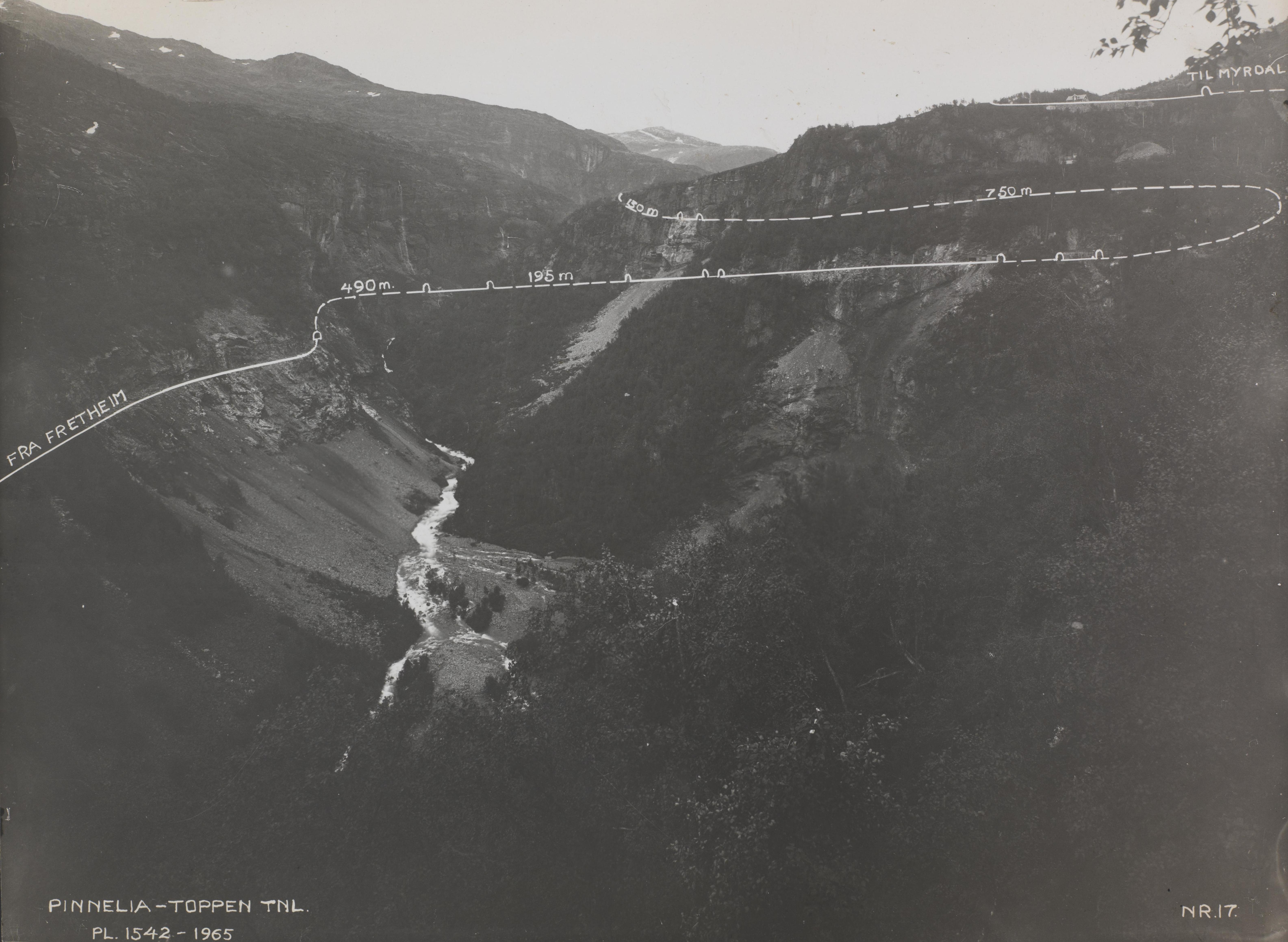 Bildet er hentet fra Nasjonalbibliotekets bildesamling Pinnelia, Aurland, Sogn og Fjordane